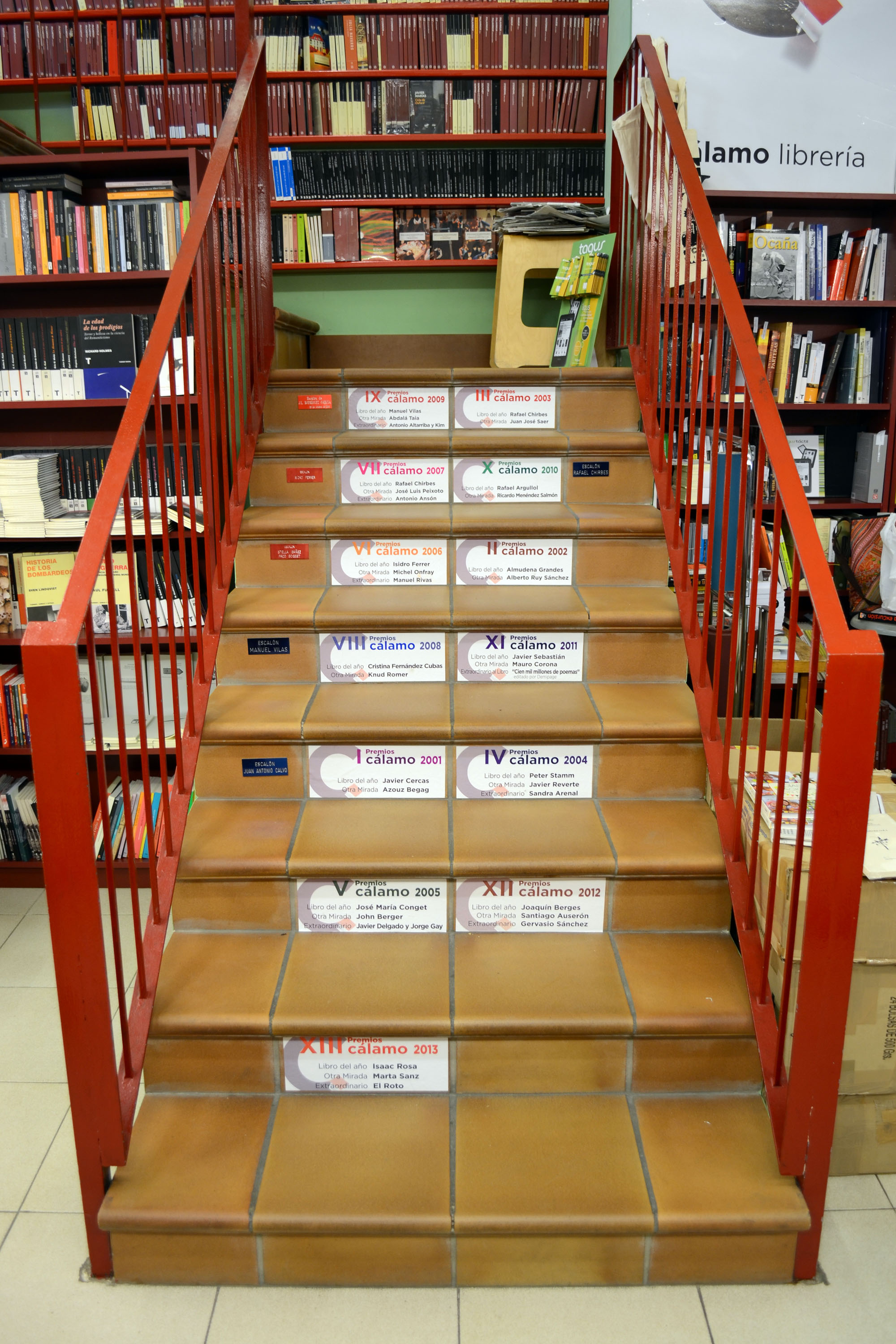 Escalera de la librería Cálamo (Zaragoza, España), en la que se exhibe una placa con los ganadores de cada una de las convocatorias de los Premios Cálamo que se han entregado hasta abril de 2014.